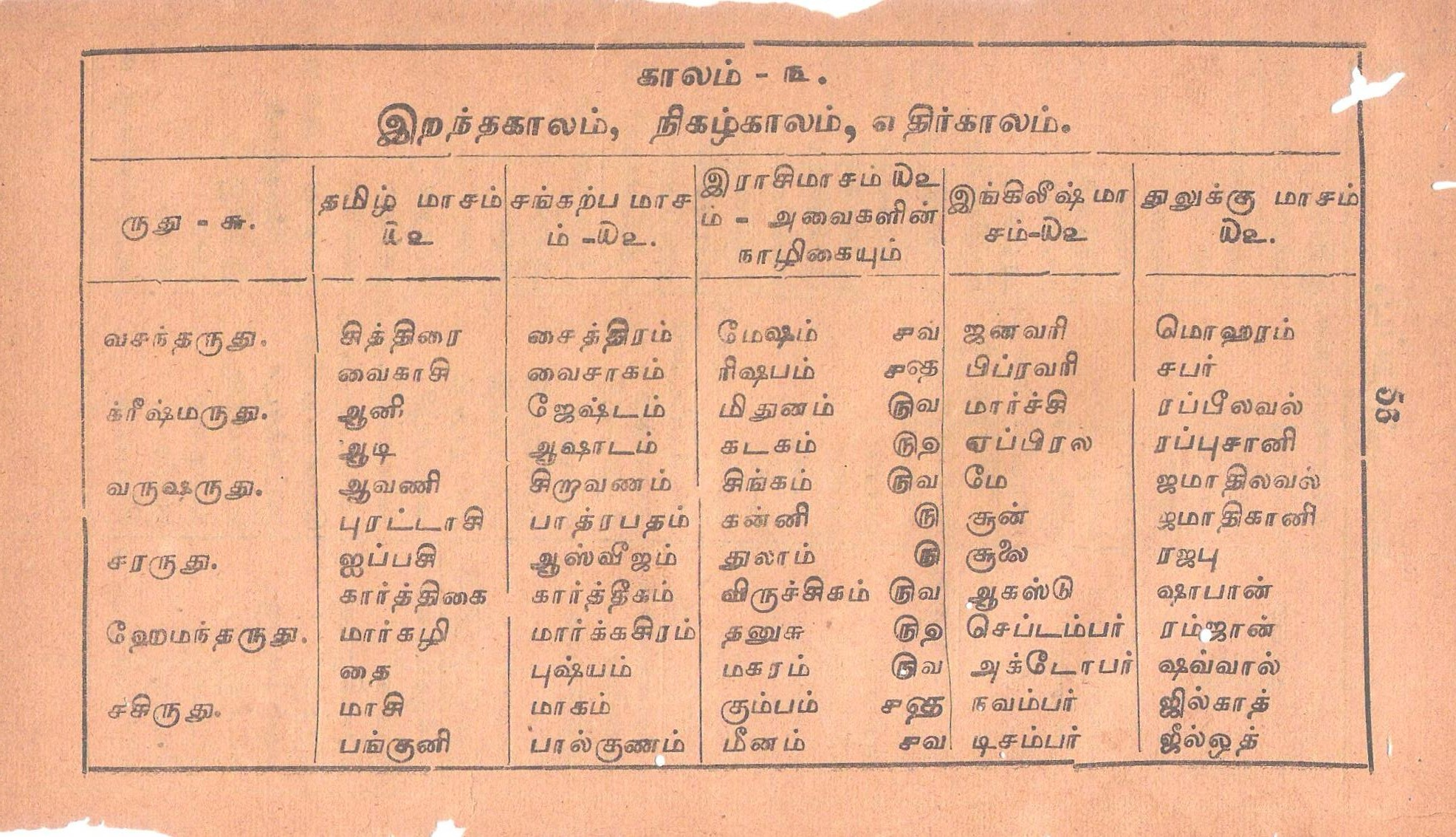 A table showing various names used to zodiac system of period in a year. தமிழ், சங்கல்பம், ஓரை முறைகளில் மாதப் பெயர்கள் வழங்கப்பட்ட முறைமையை விளக்கும் ஆவணம்.